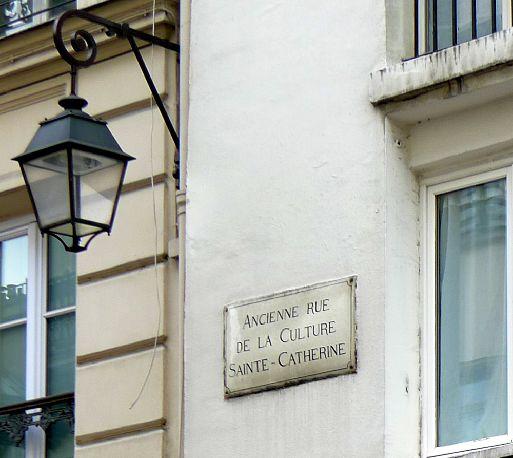 Rue de Sévigné (ancienne plaque) - Paris IV